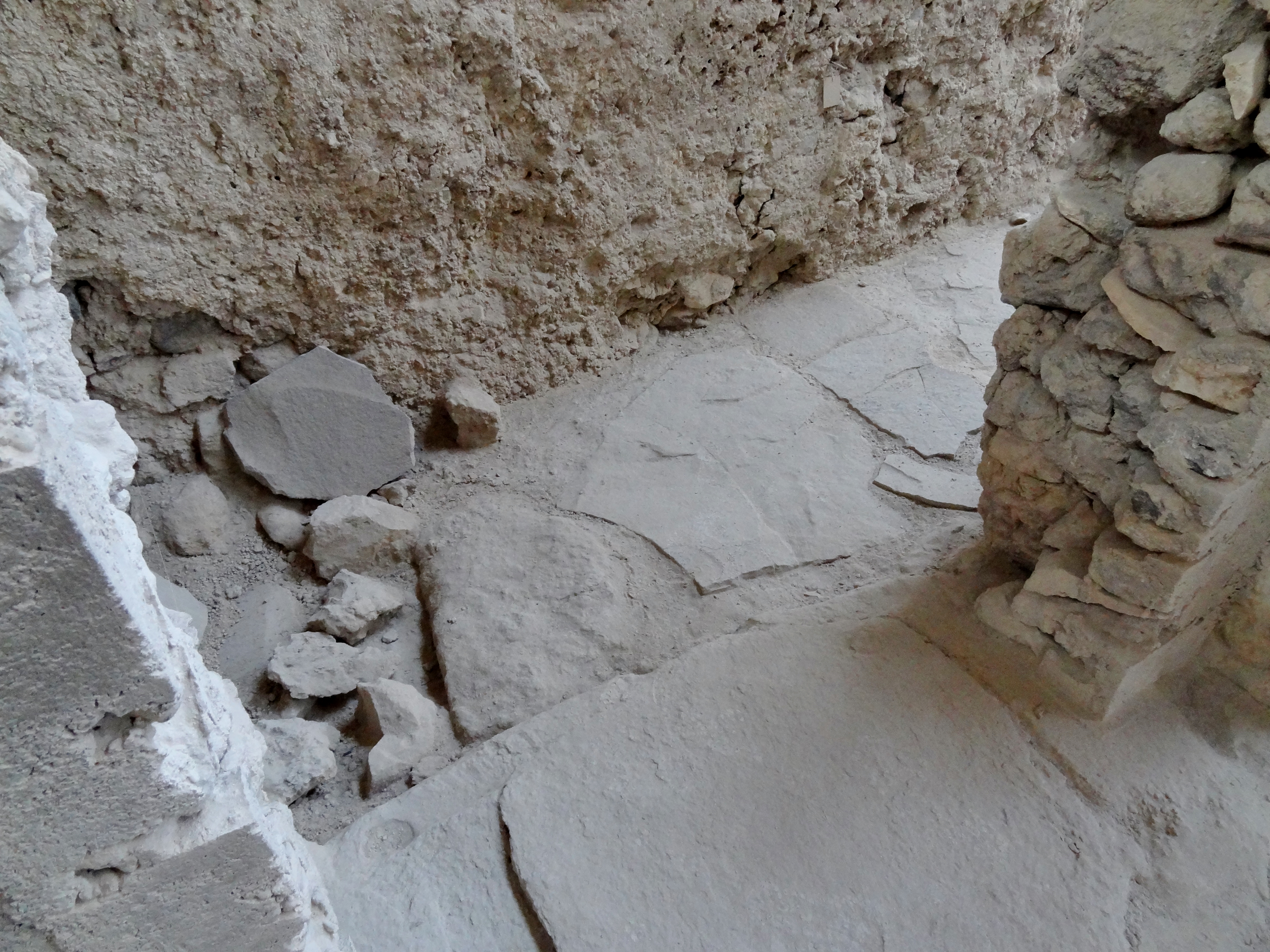 Ausgrabungsstätte von Akrotiri auf Santorin, Kykladen, Griechenland